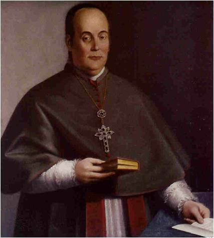 Retrato del eclesiástico español Manuel Verdugo y Albiturría (1749-1816), que llegó a ser obispo de Canarias.